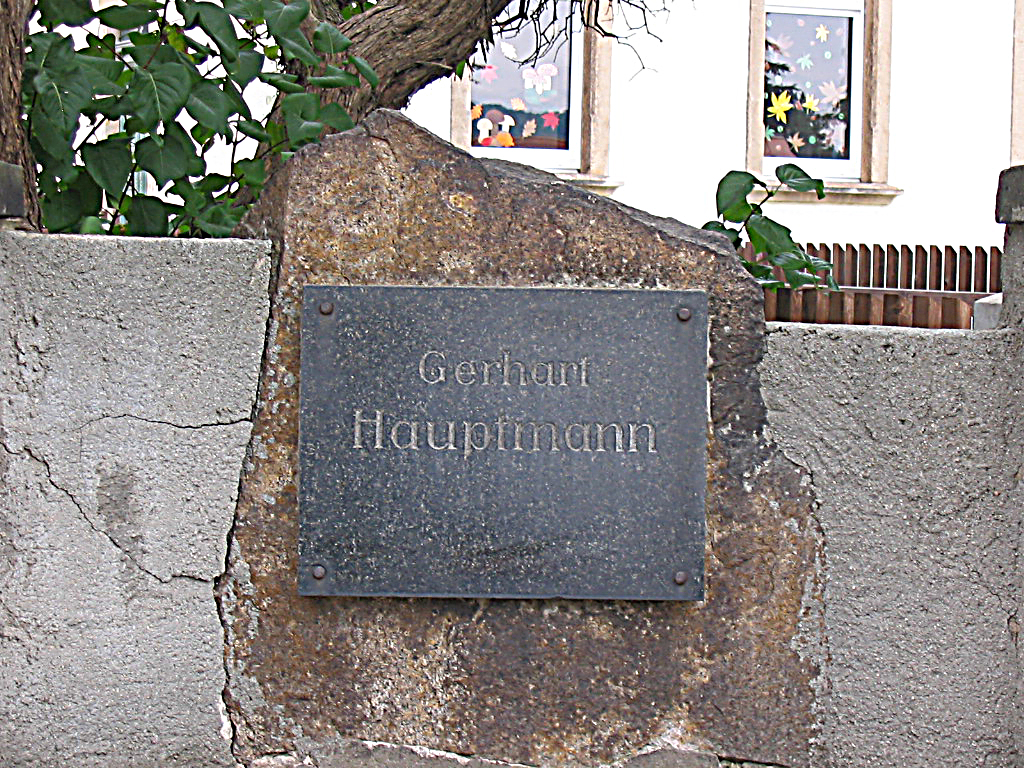 Gerhart-Hauptmann-Gedenkstein (Radebeul), Namenstafel